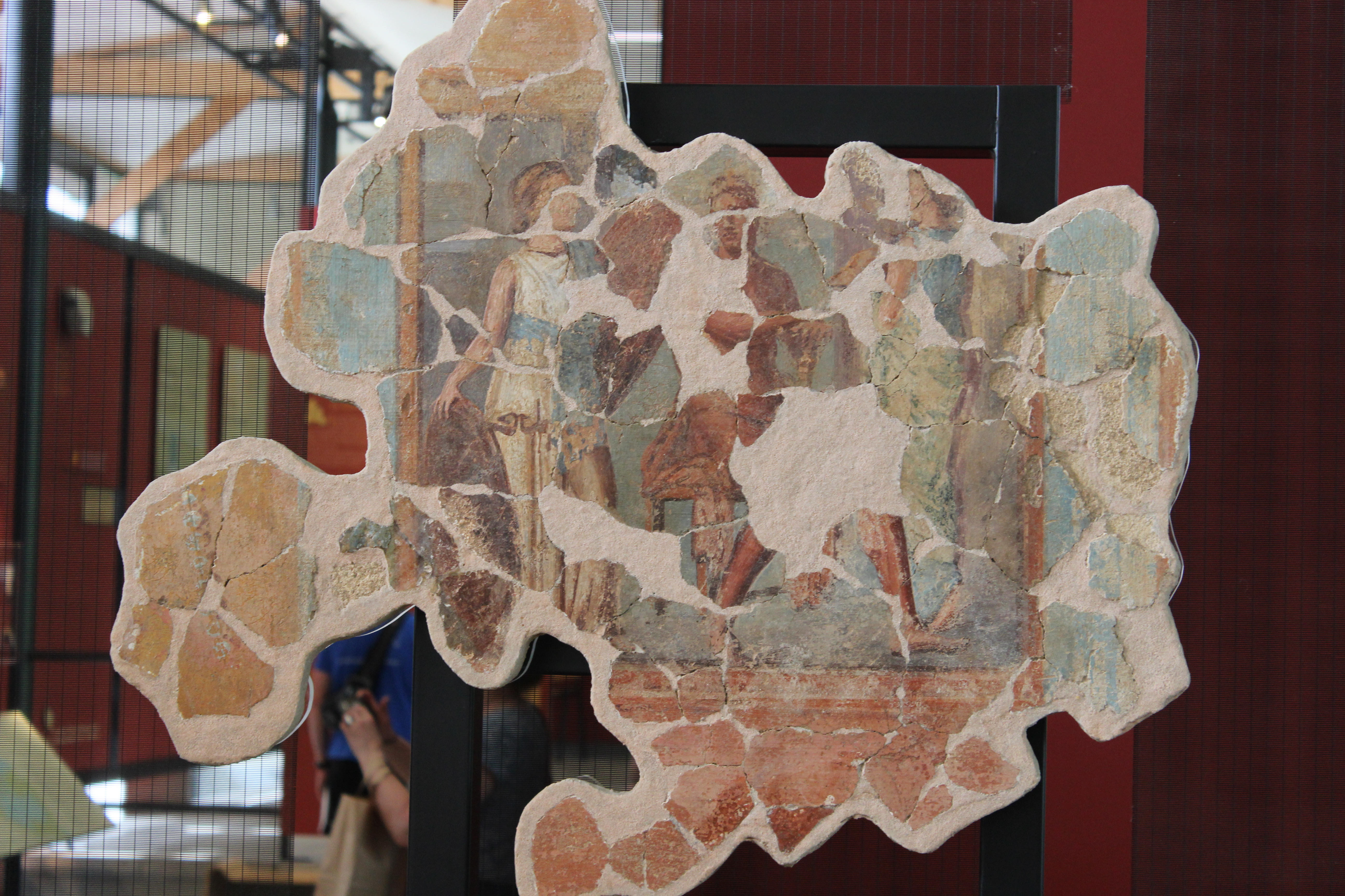 Fresque à motif mythologique de Vieux